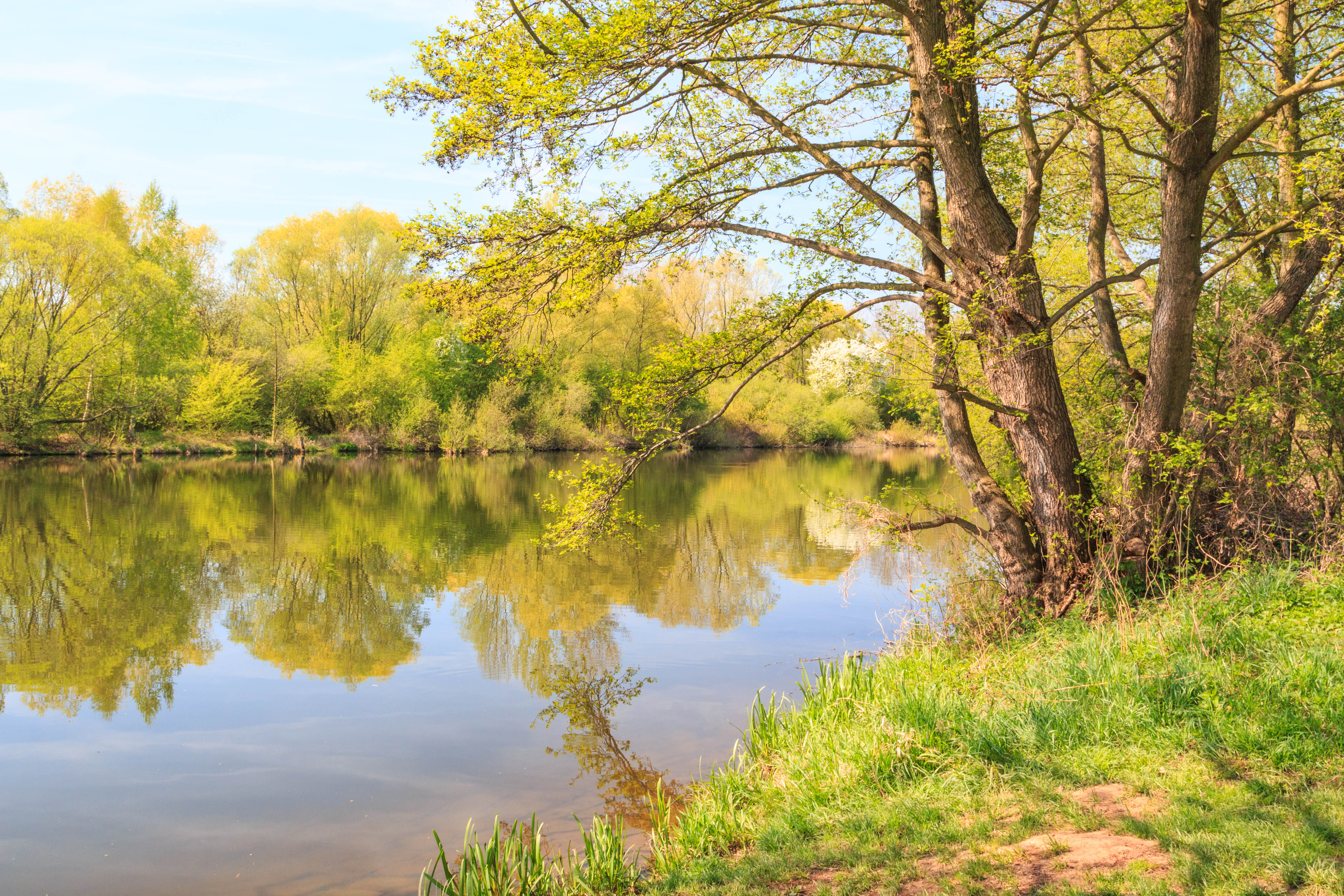 Zákoutí u Pardubic Project: Vodstvo.